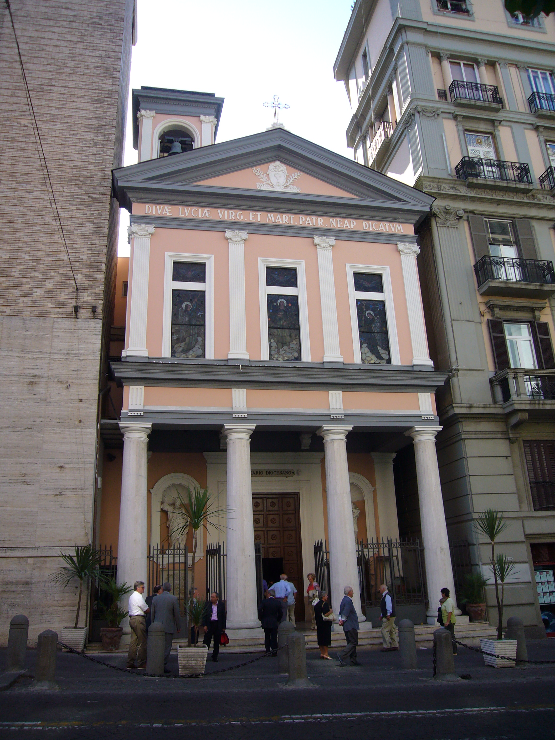 Napoli, Santa Lucia a mare